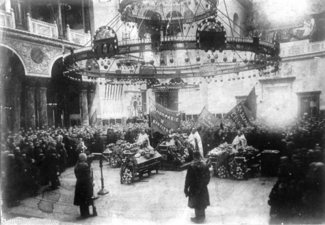 Beerdigung der Kronstädter Opfer der Februarrevolution in der Marinekathedrale von Kronstadt.